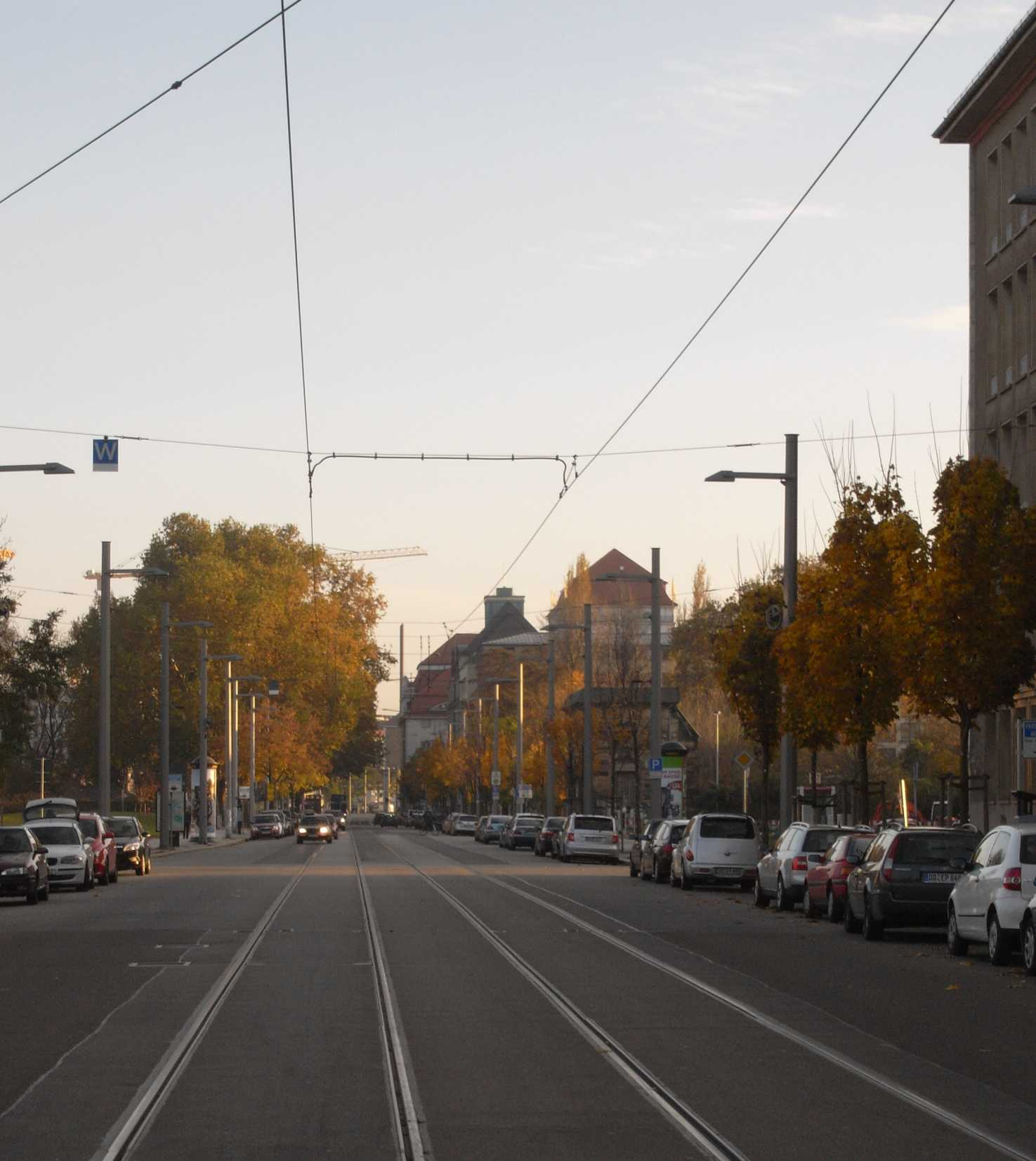 Ostra-Allee in Dresden, Blick zum Postplatz (Sachsen, Deutschland)